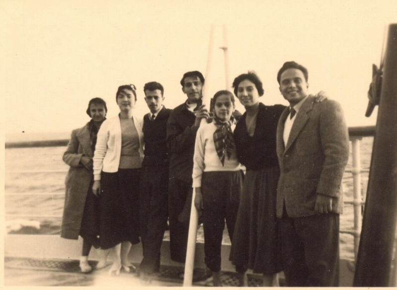 קבוצת מפונים מיהוד פורט סעיד על אניה צרפתית